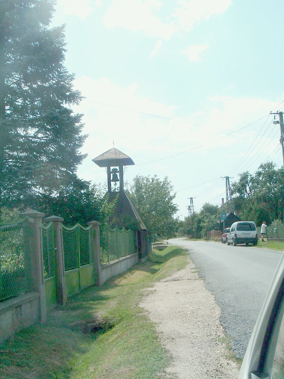 Kemestaródfa